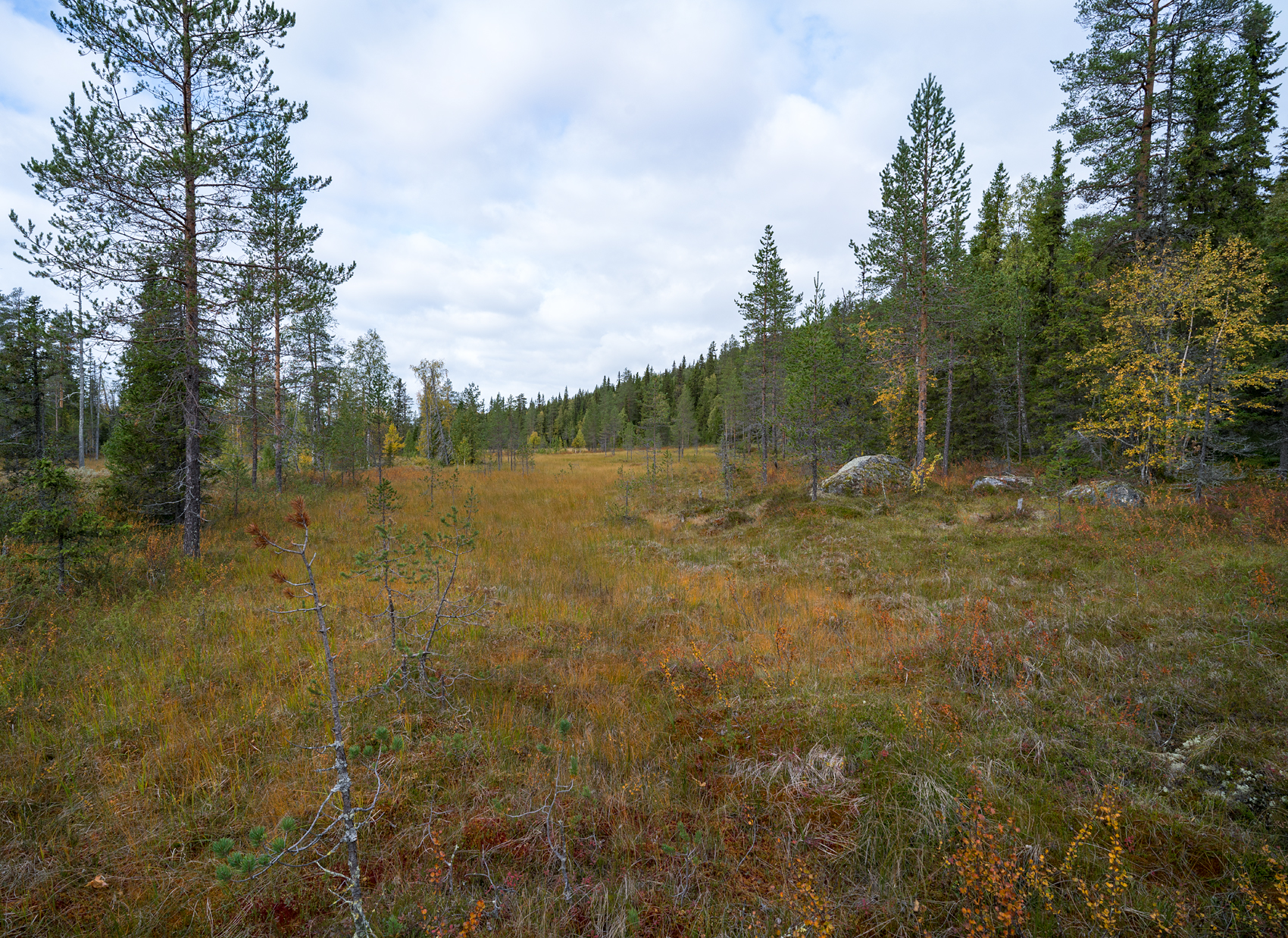 Mesjödalsmyran.